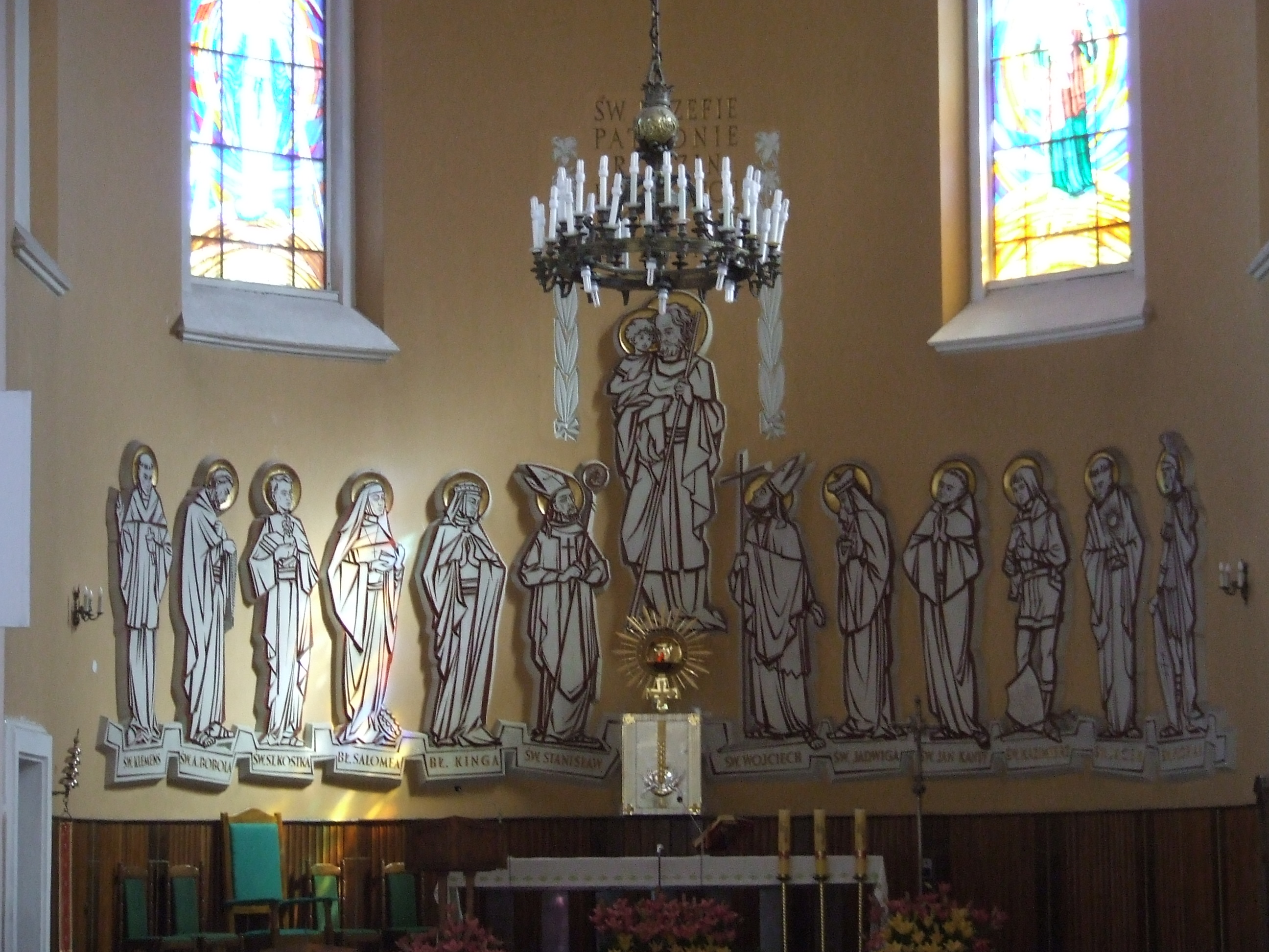 Ołtarz kościoła Św. Józefa w Łodzi-Rudzie Pab. Autor:Walther, 2006